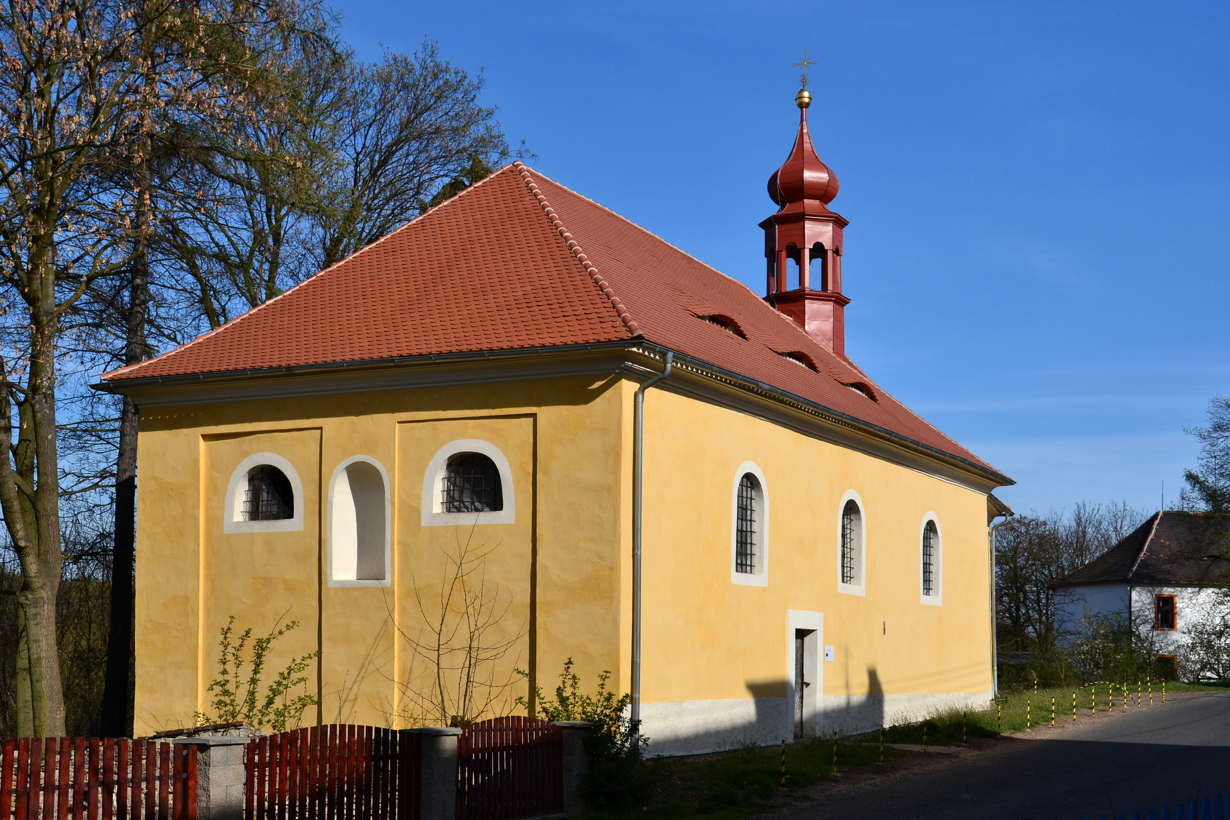 Kostel svatého Vavřince v Hořeticích po statickém zabezpečení a vnější opravě z roku 2013, Hořetice (Žiželice).